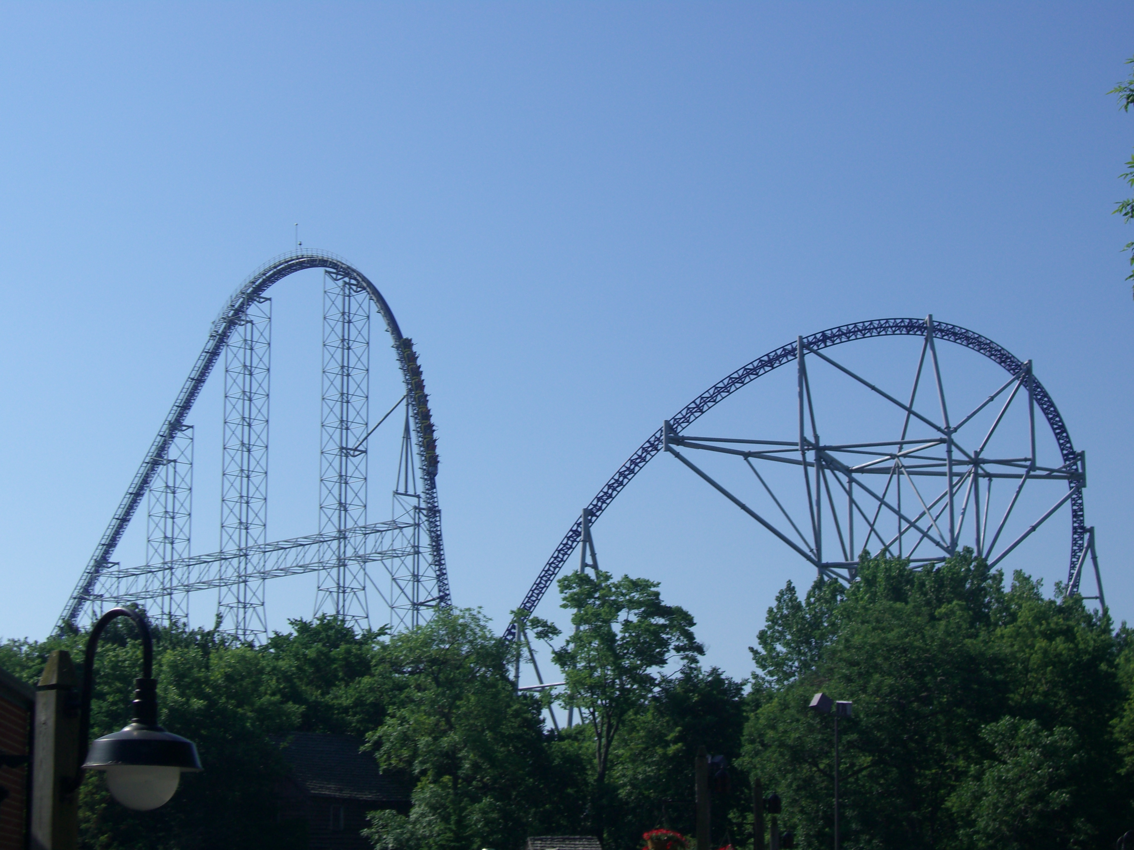 Millennium Force , montagnes russes à Cedar Point